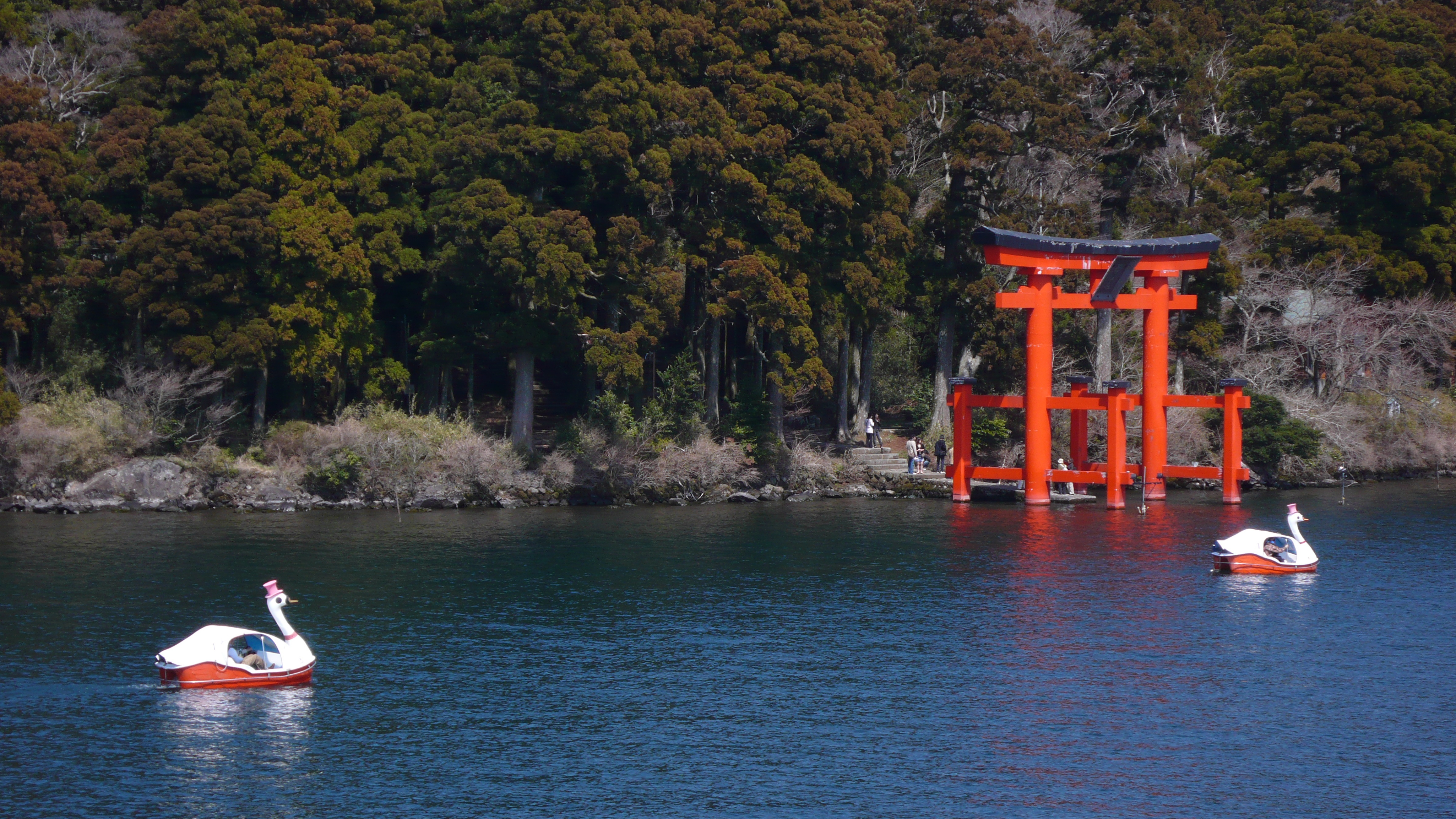 Patos de recreo a pedales en el lago Ashi. Al fondo un Torii flotante. Este escenario aparece en el cómic La banda del dragon despeinado, de Superlópez